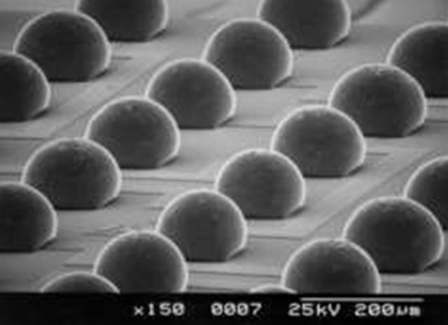 photo electroless nickel